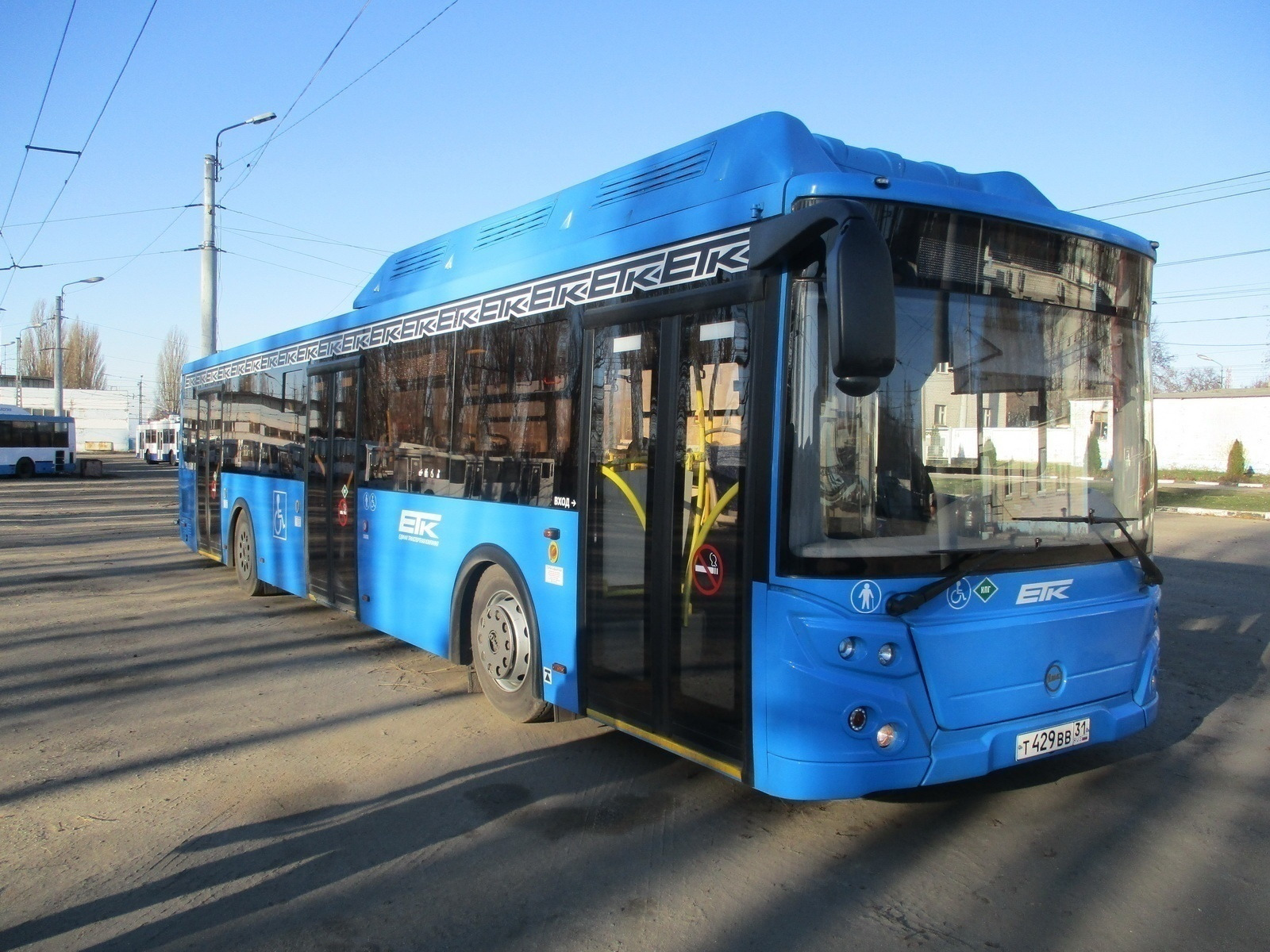 Автобус главного перевозчика Белгородской агломерации ООО "ЕТК